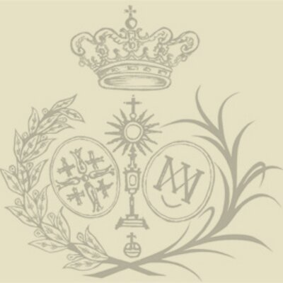 EScudo Cofradía del Socorro (Antequera)